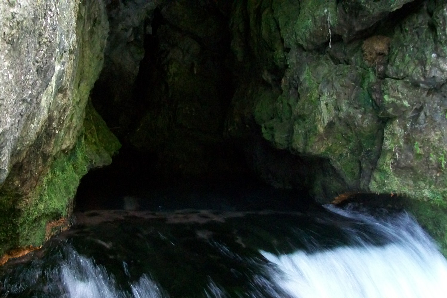 Quelle der Sanica